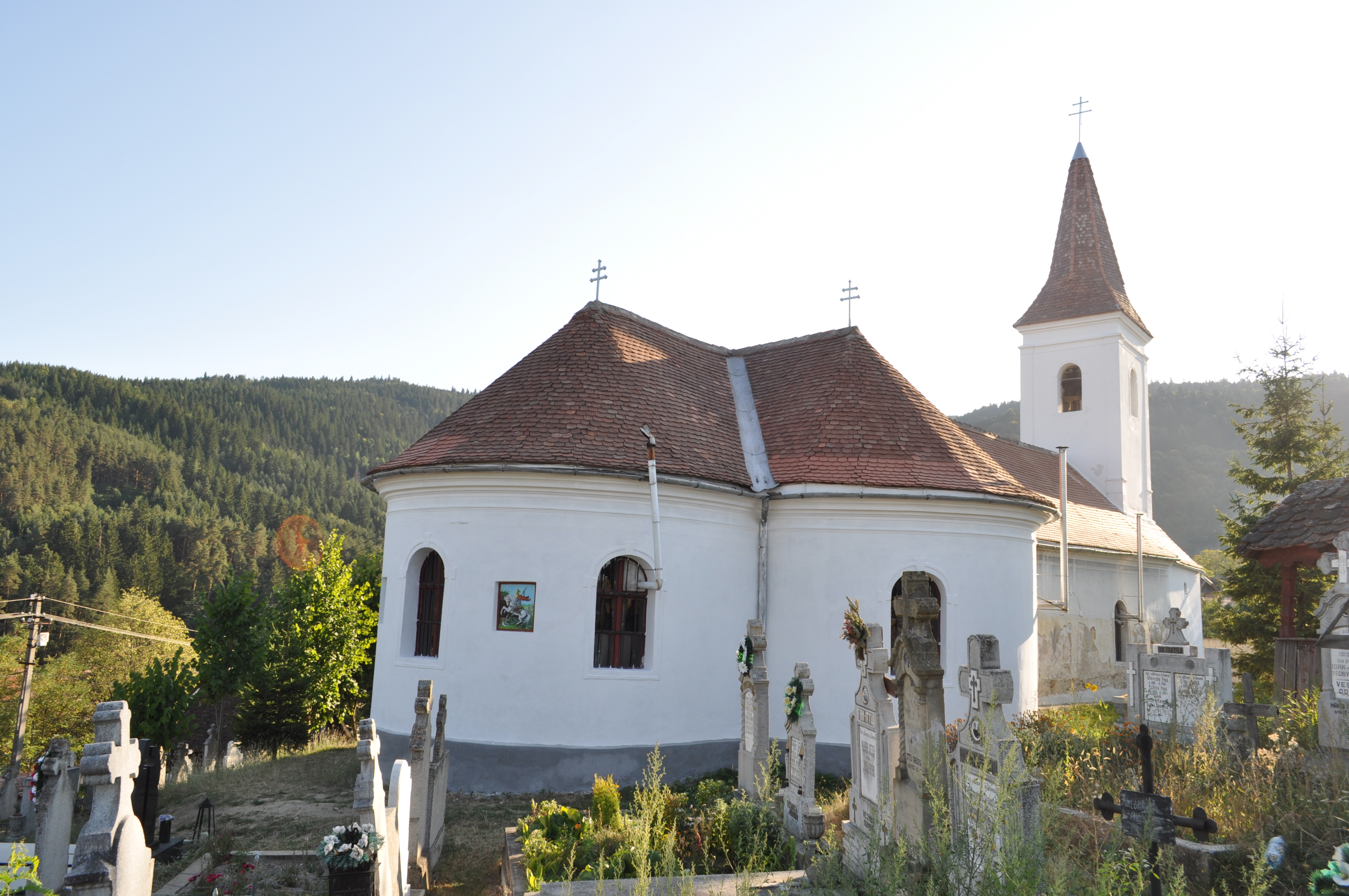 Biserica ortodoxă „Sfânta Treime”